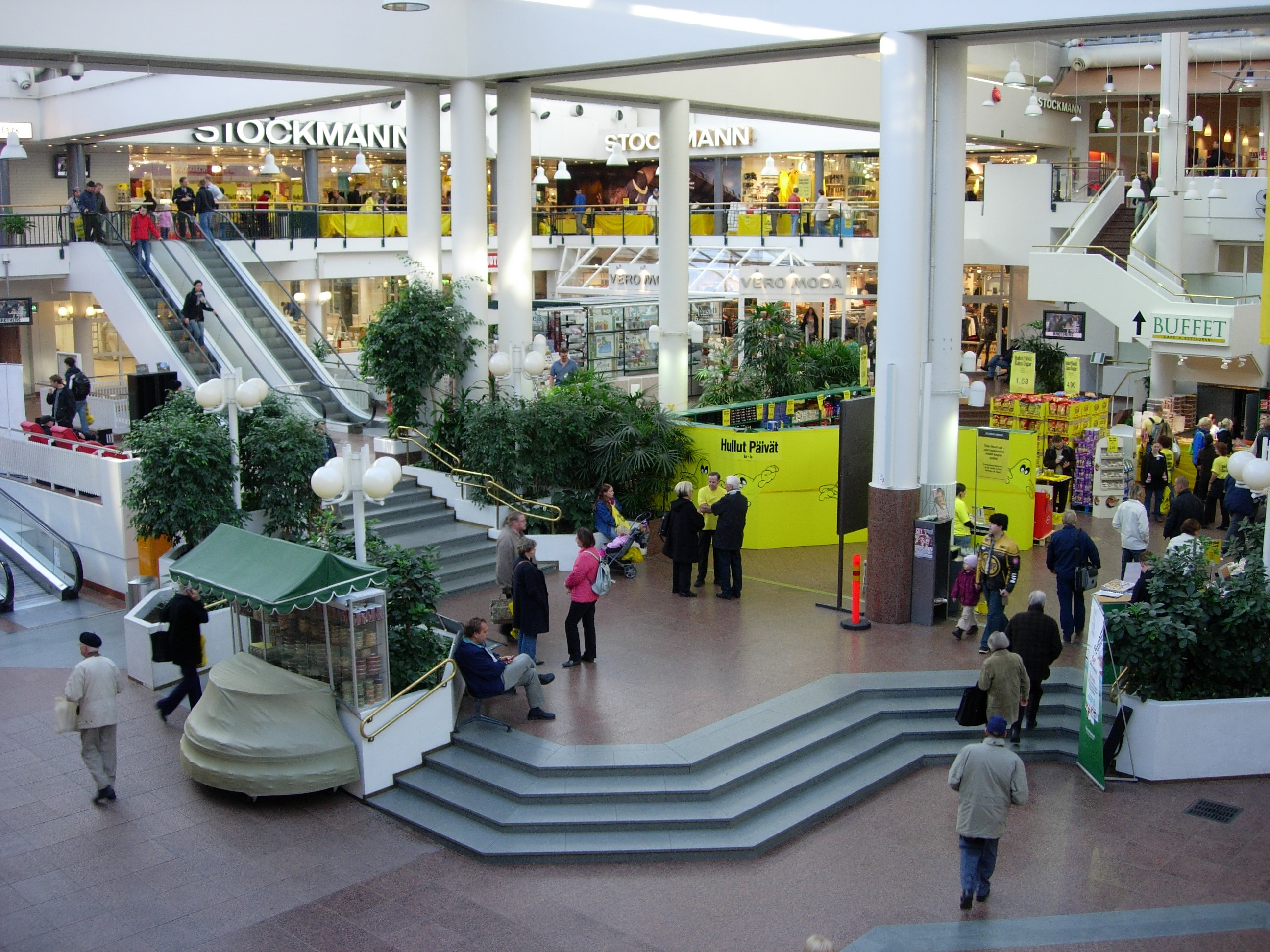 Hansakorttelin Hansatori, Turku.